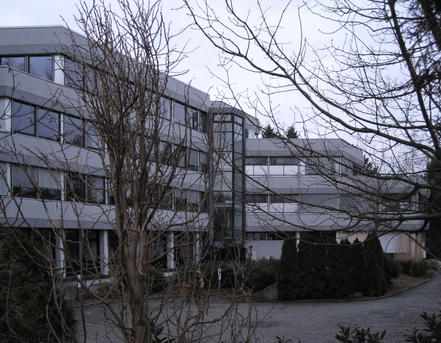 Verwaltungsgebäude der Fa. Dohle